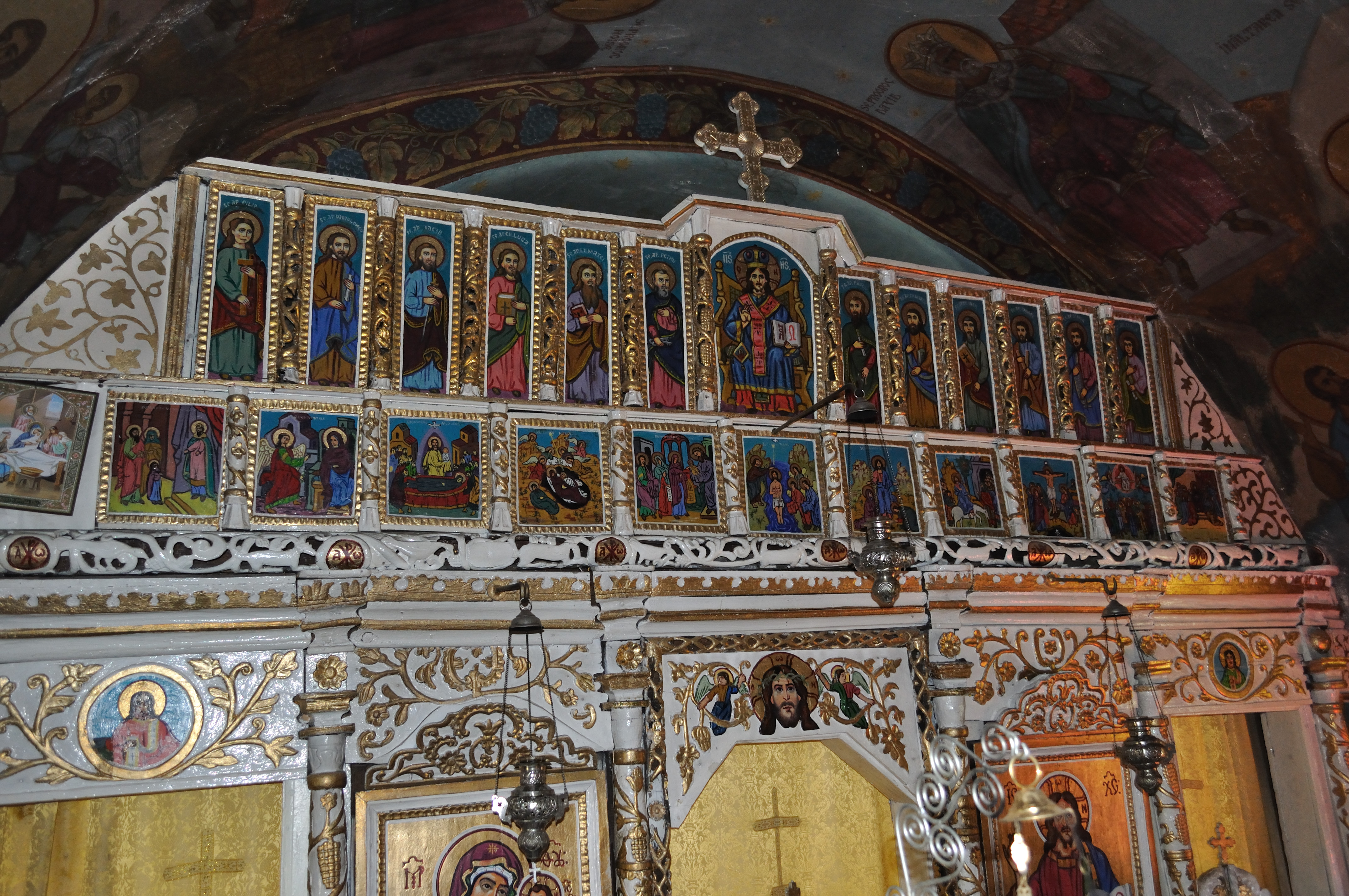 Biserica de lemn din Țăgșor, Bistrița-Năsăud